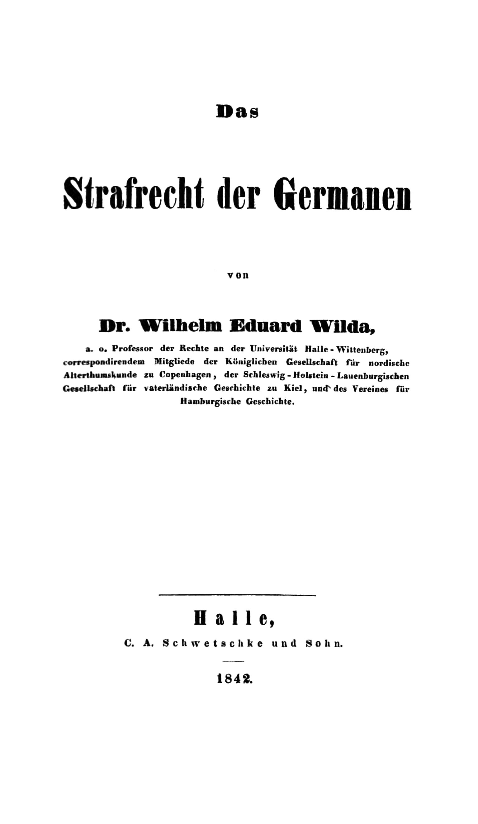 Das Strafrecht der Germanen